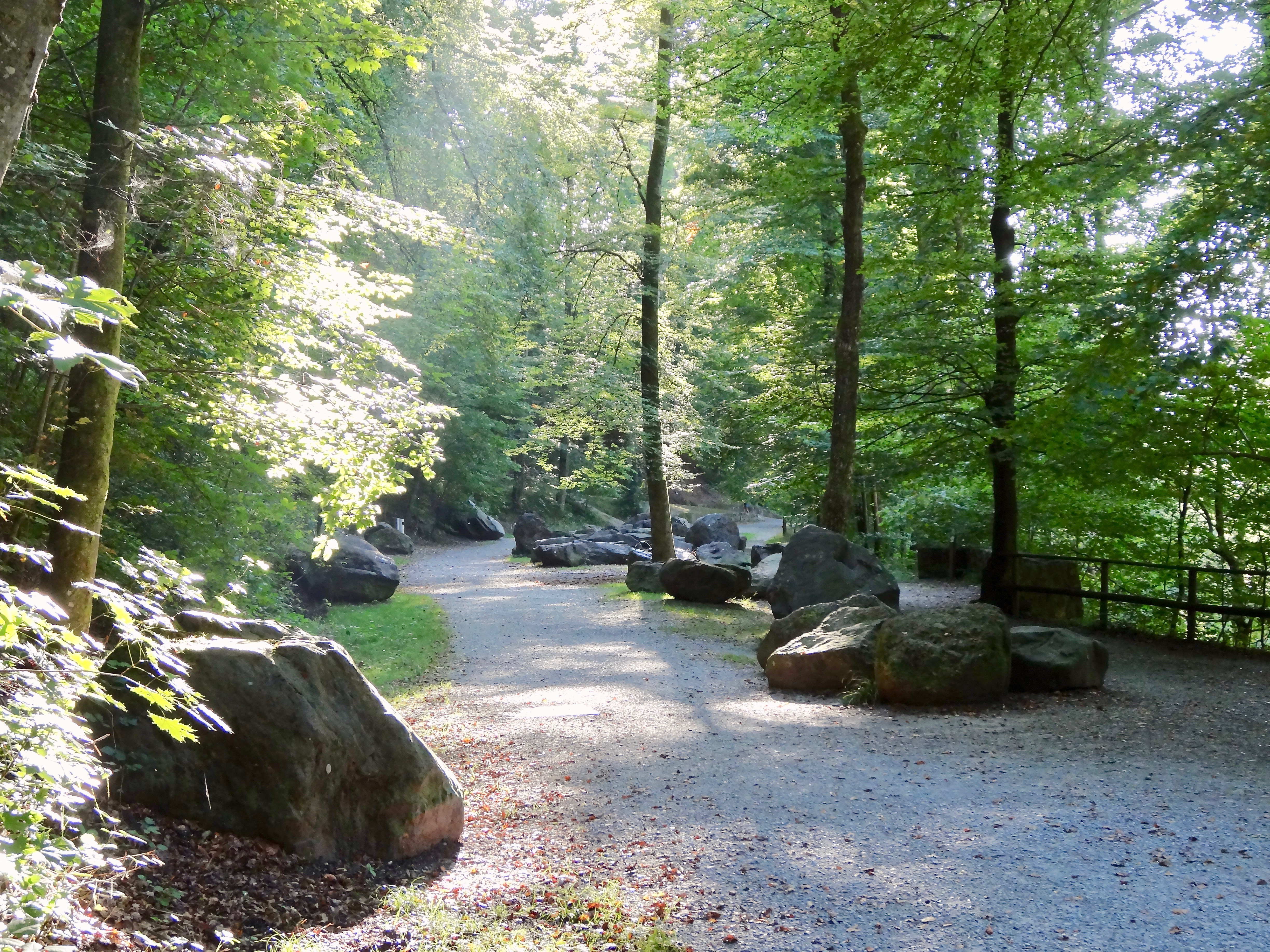 Der Findlingsgarten am späten Nachmittag